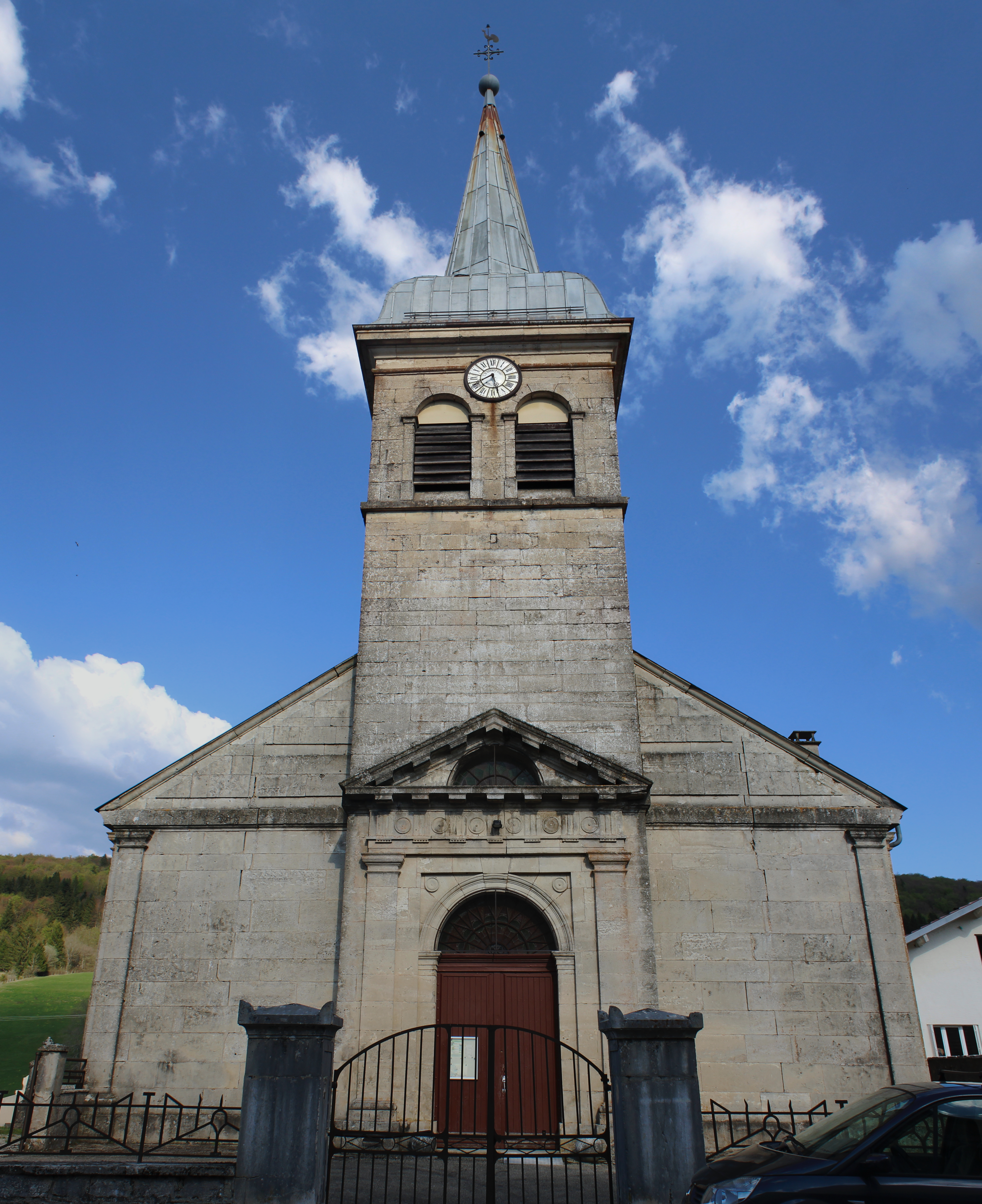 Église Saint-Amant de Charix.